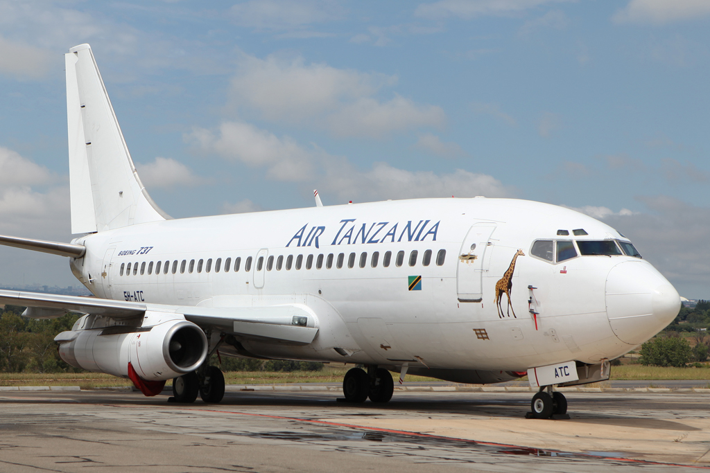 5H-ATC B737-200 Air Tanzania